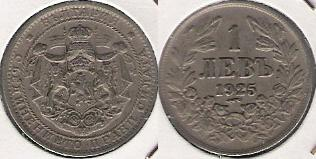 Bulgaria: 1 leva 1925